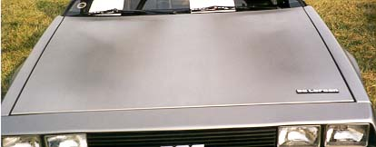 1983 De Lorean Hood style.